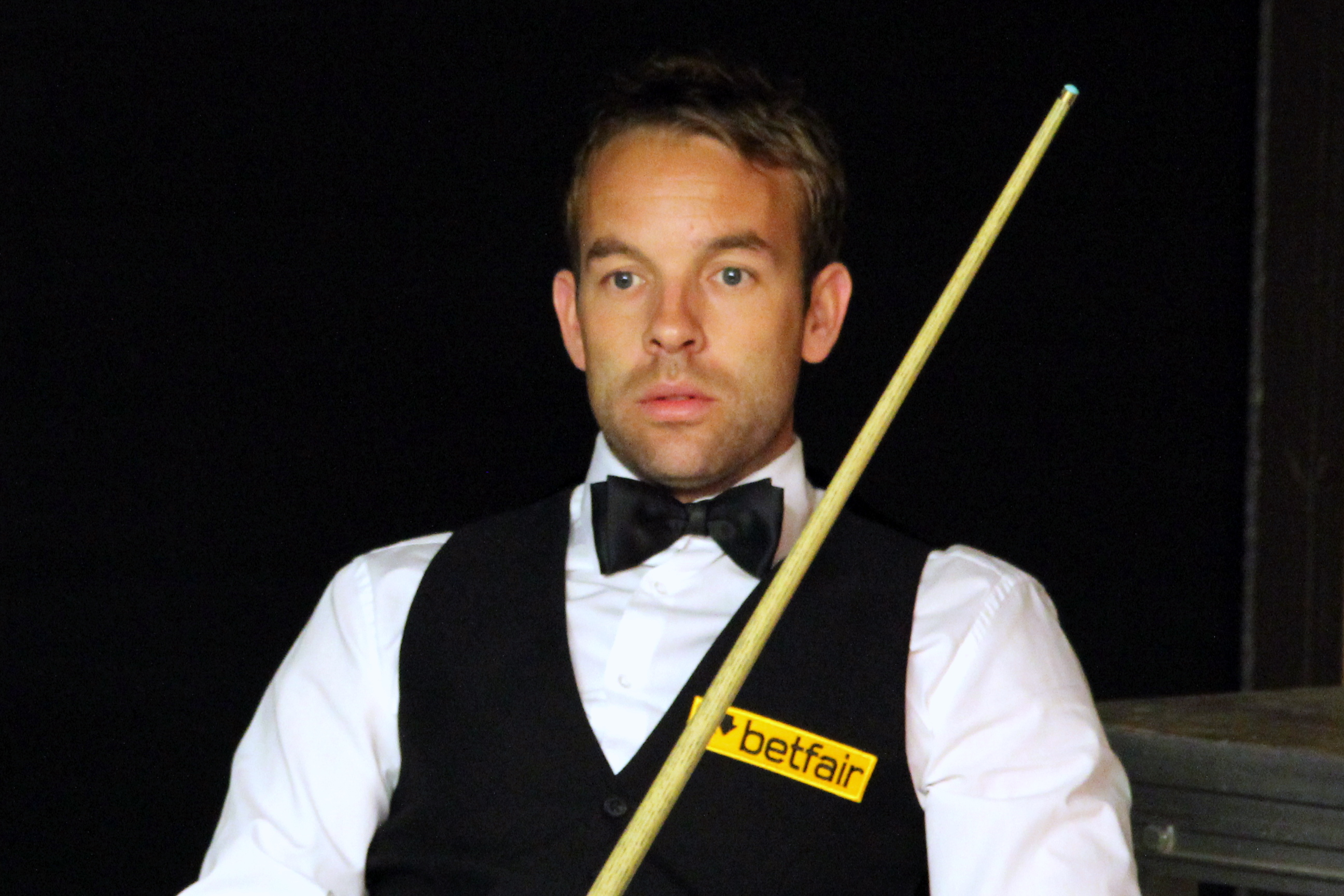 Ali Carter beim Paul Hunter Classic 2012